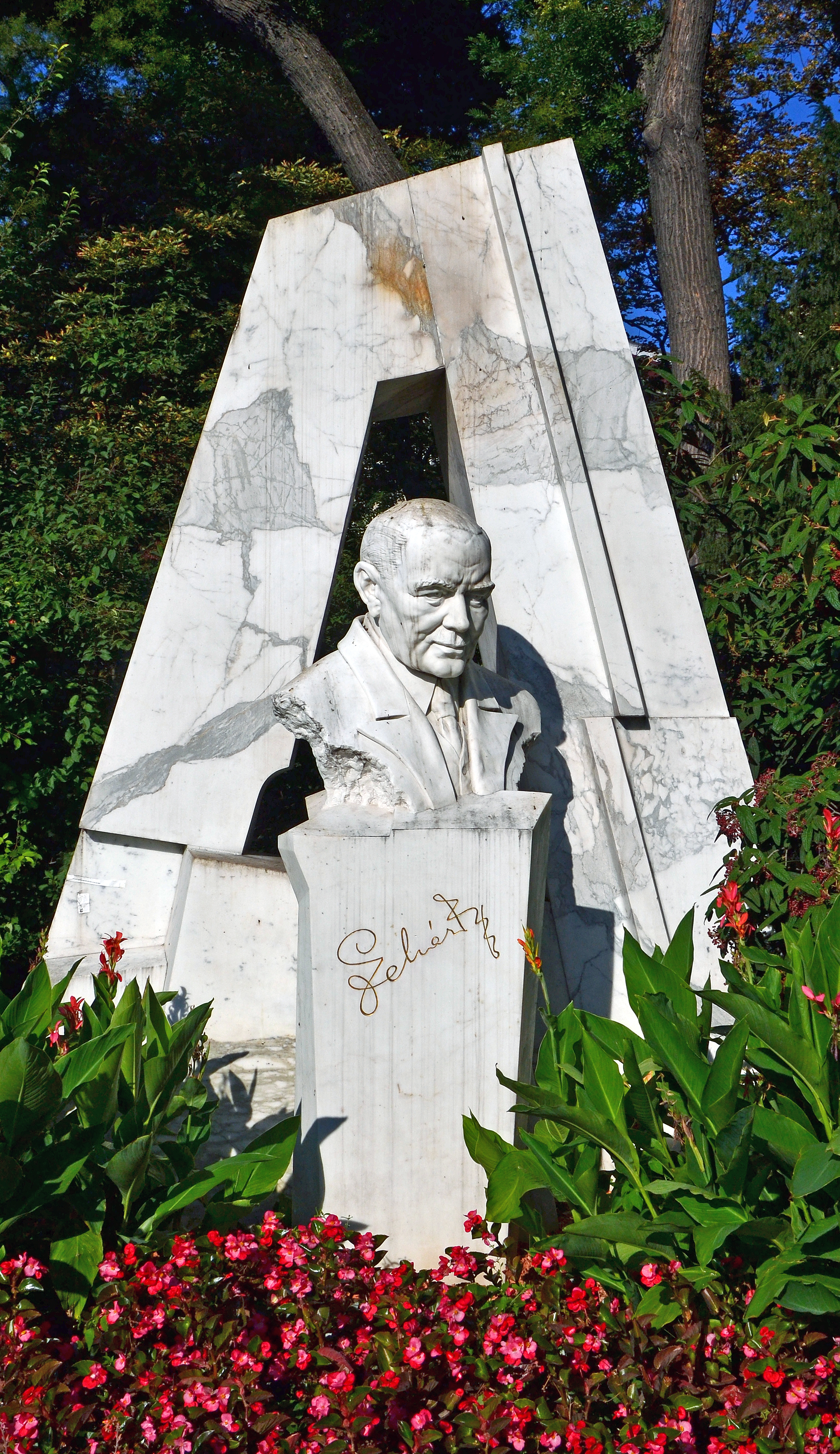 Bildhauer: Franz Coufal, Enthüllung: 1980